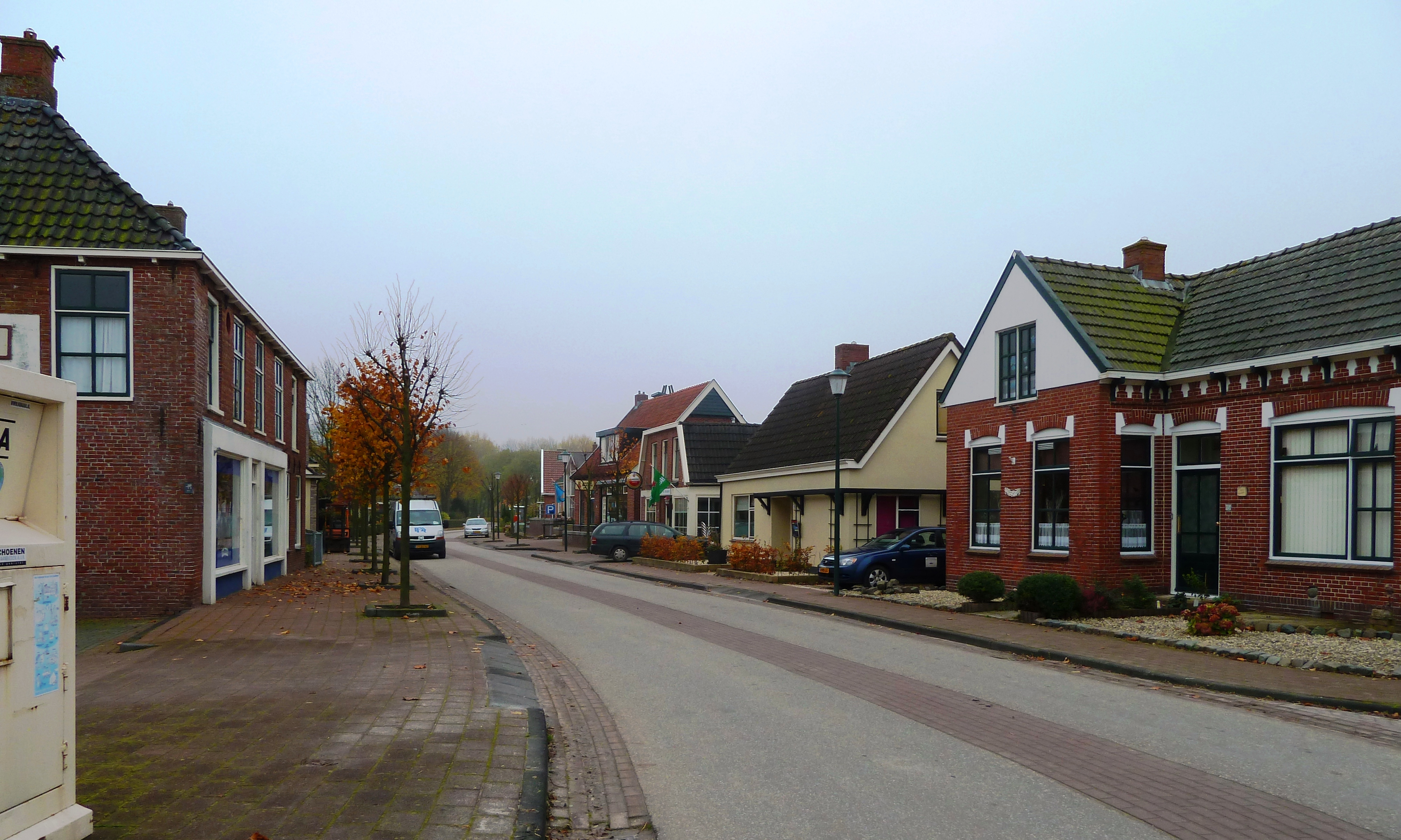 Dorpsstraat in Kommerzijl.